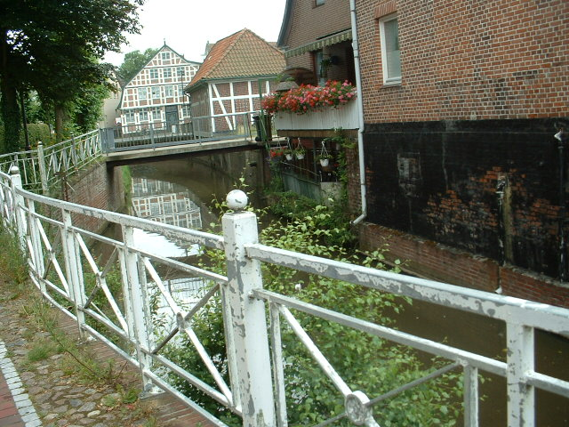 Kanal in Jork